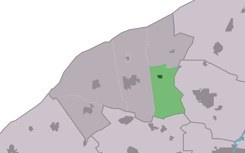 Kaartsje fan himrik fan Froubuorren